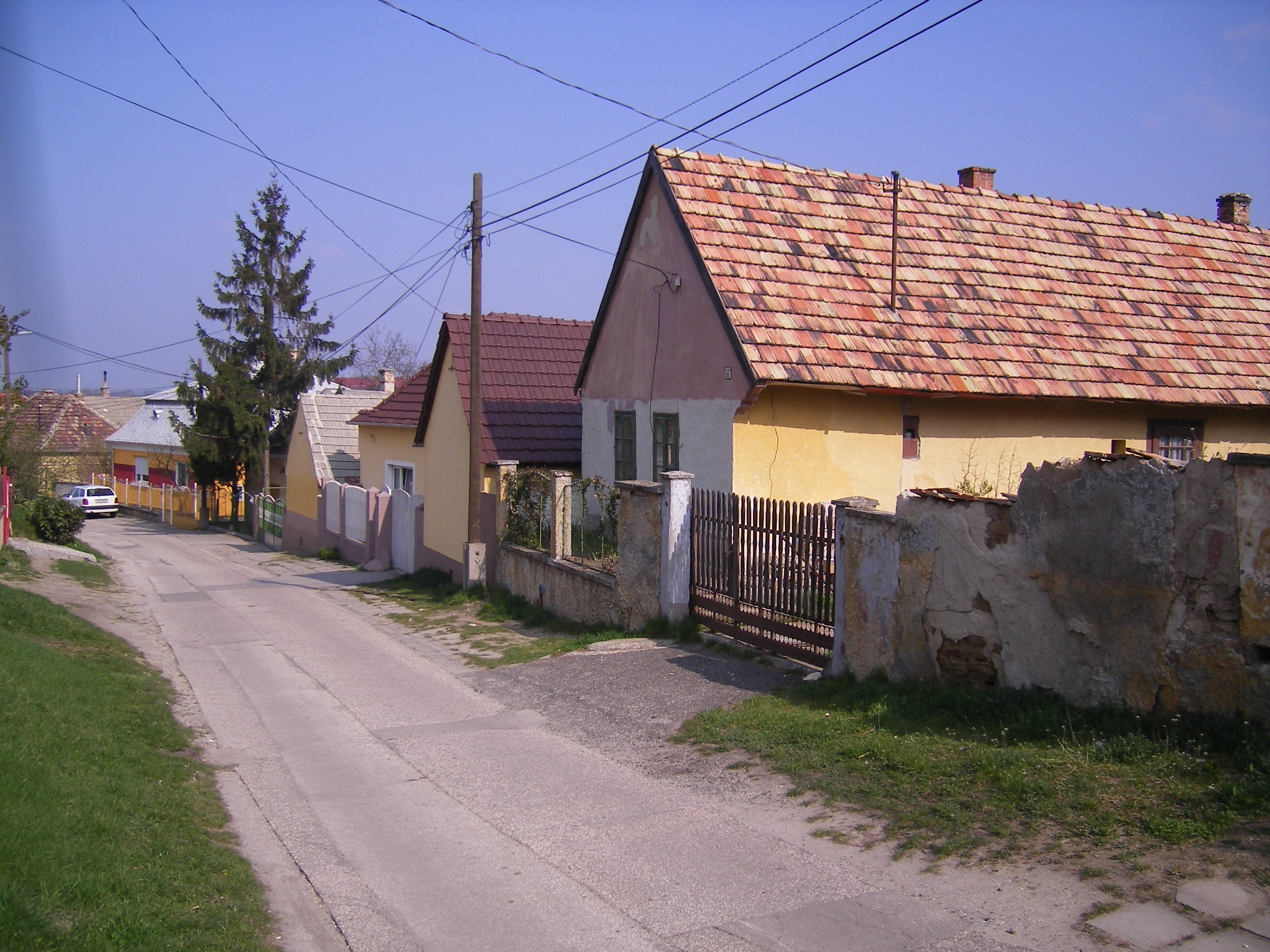 Oroszlány - Várdomb utca